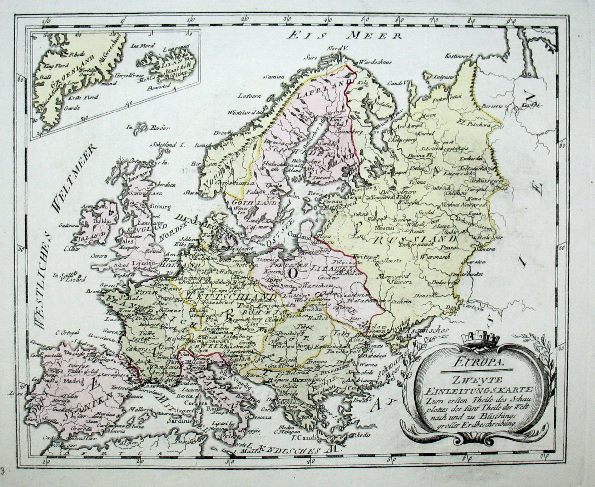 Europa. Zweyte Einleitungskarte Zum ersten Theile des Schauplatzes der fünf Theile der Welt nach und zu Büschings grosser Erdbeschreibung. Kolorierter Kupferstich